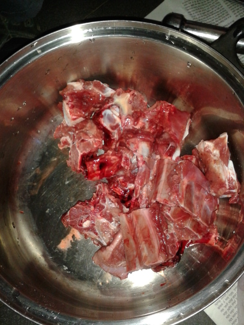 Hình chụp bằng máy cá nhân về thịt tươi ở Việt Nam